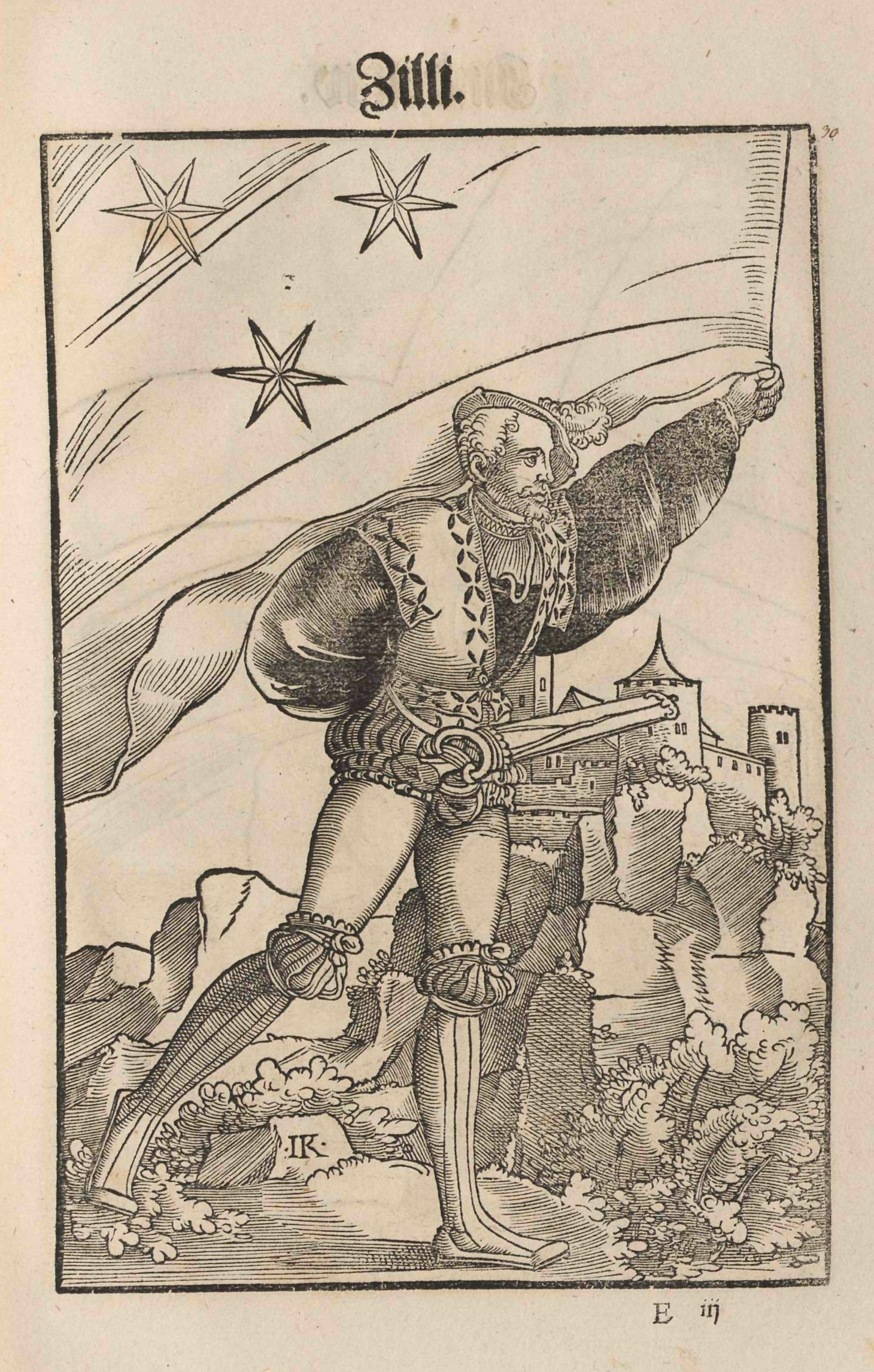 Jacob Koebel (Vorrede): Wapen. Des Heyligen Römischen Reichs Teutscher nation. Gedruckt bei Cyriacus Jacob (evtl. auch Herausgeber/Autor), Frankfurt am Main 1545, Holzschnitte von Jacob Kallenberg. Zu Angaben zur Tingierung (Farbgebung) der Wappen siehe das Register ab Bild Nr. 165. Zilli (Cilli, Celje)